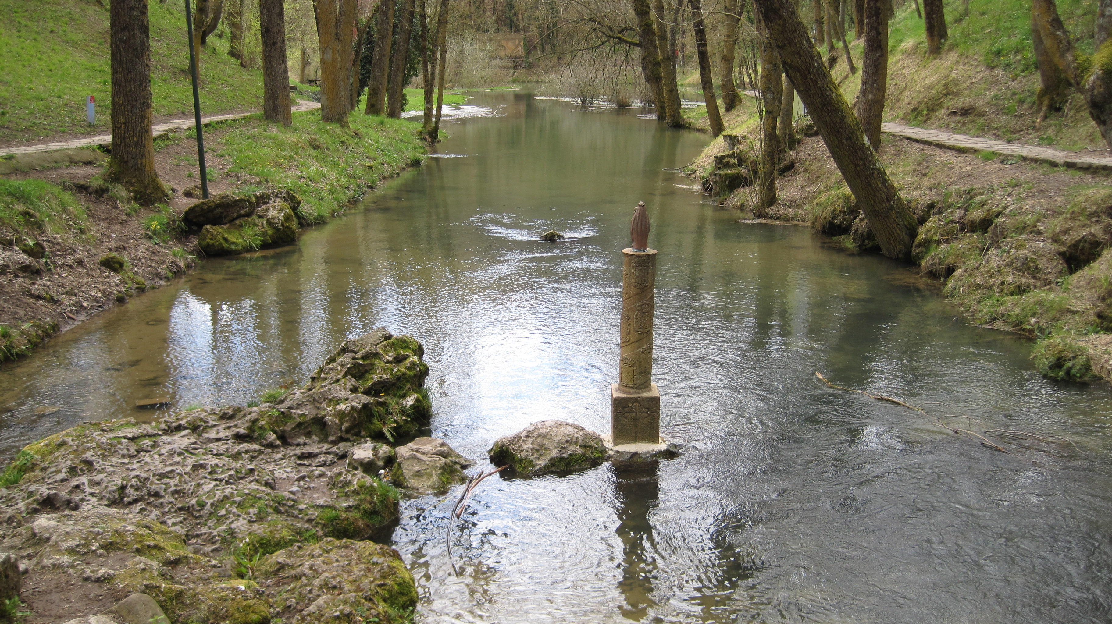 Vista del nacimiento del río Ebro, en Fontibre, Cantabria.